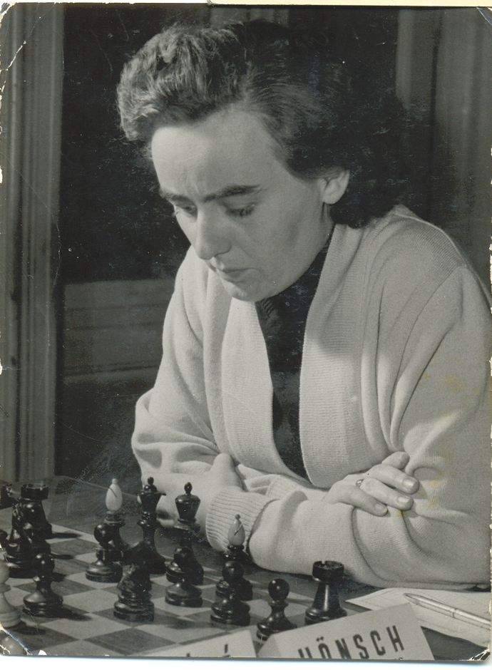 Hönsch Irén, 1957-ben magyar női sakkbajnoknő